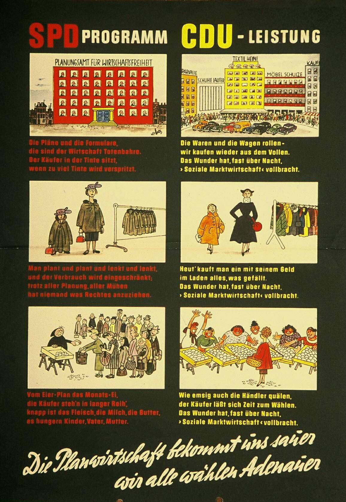 SPD Programm / CDU - Leistung ... Die Planwirtschaft bekommt uns sauer wir alle wählen AdenauerKommentar:WirtschaftswunderPlakatart:Motiv-/TextplakatKünstler_Grafiker:Hans KossatzAuftraggeber:CDU-Bundesgeschäftsstelle BonnDrucker_Druckart_Druckort:Kölnische Verlagsdruckerei GmbH, KölnObjekt-Signatur:10-001: 402Bestand:Plakate zu Bundestagswahlen (10-001)GliederungBestand10-18:Plakate zu Bundestagswahlen (10-001) » Die 2. Bundestagswahl am 6. September 1953 » MotivplakateLizenz:KAS/ACDP 10-001: 402 CC-BY-SA 3.0 DE